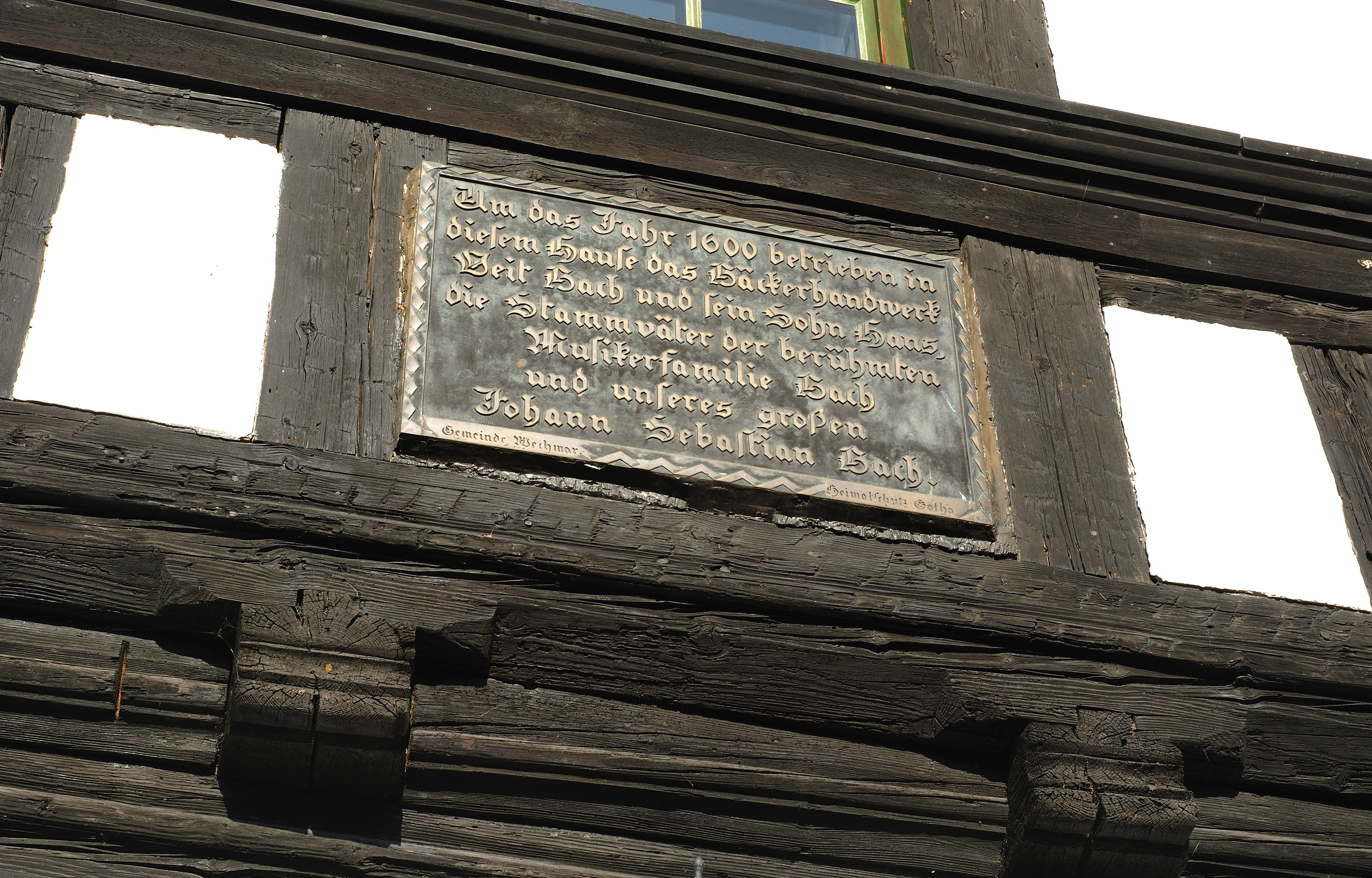 Schild am Bachhaus in Wechmar